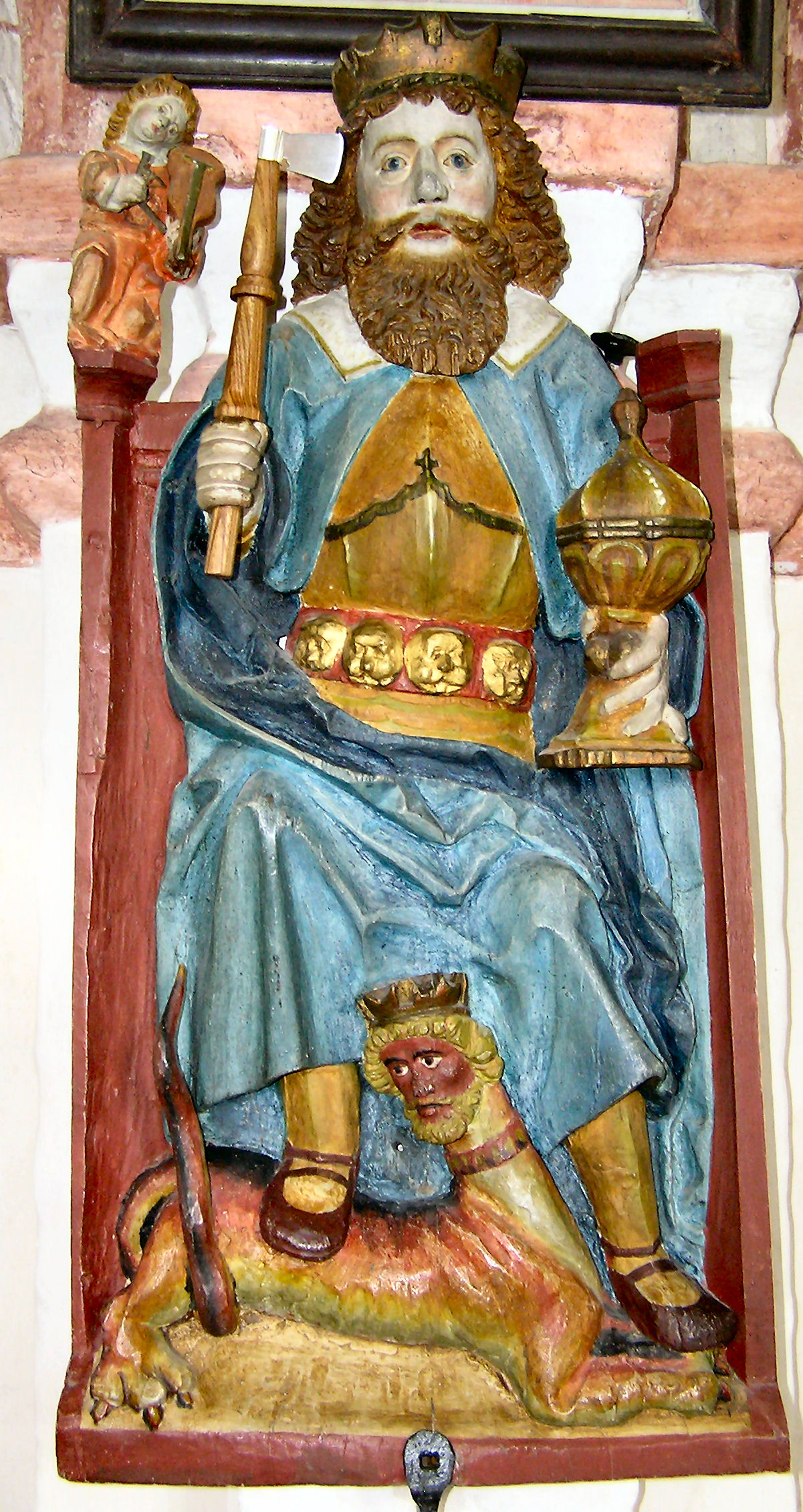 Sankt Olofs Kirke i Skåne, Helgenbillede: Olav den Hellige